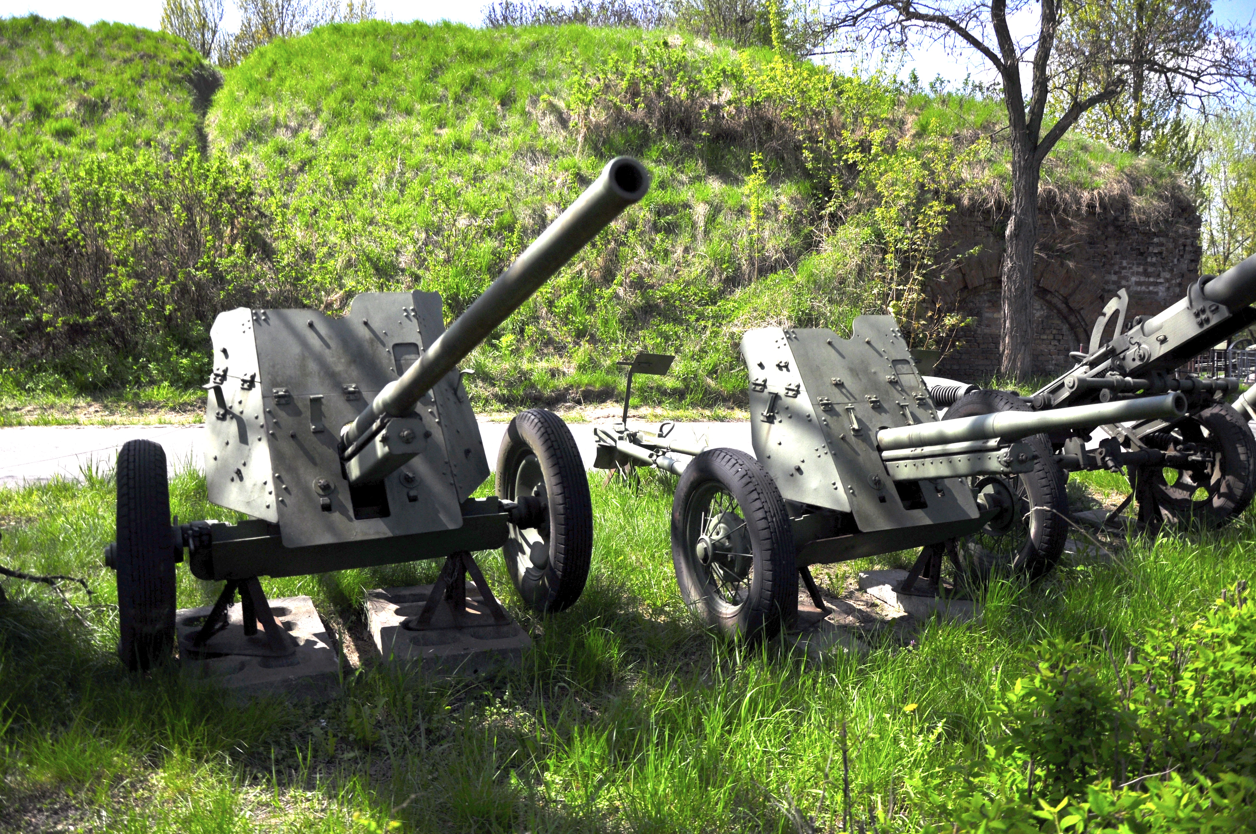 Militärmuseum Sadyba, Warschau